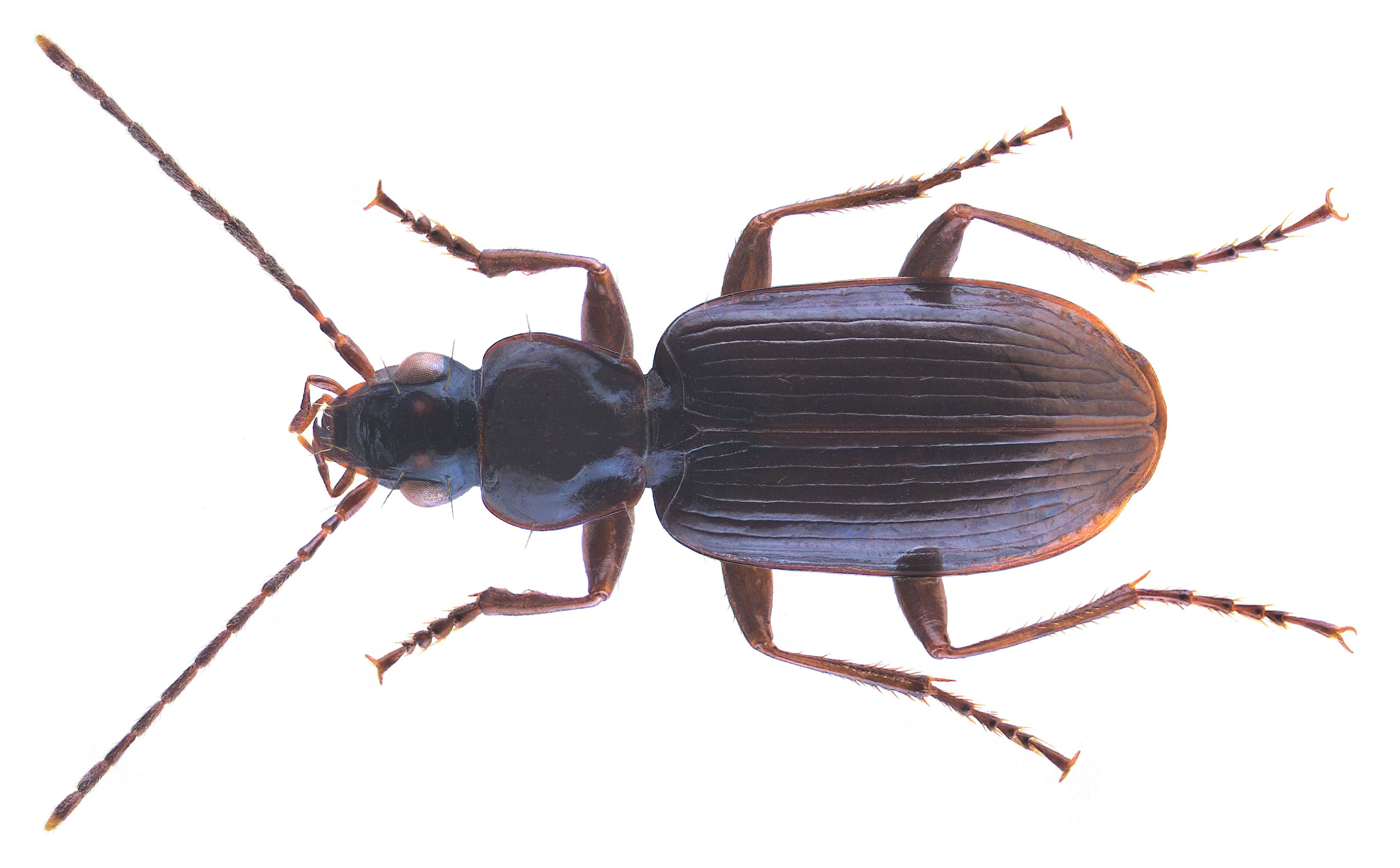 Familie: Carabidae Größe: 7-10 mm Verbreitung: Westpalaearktis Ökologie: stenotop in feuchten Wäldern Fundort: Germania, Bayern, Deggendorf leg.det. U.Schmidt, 1978 Foto: U.Schmidt, 2008